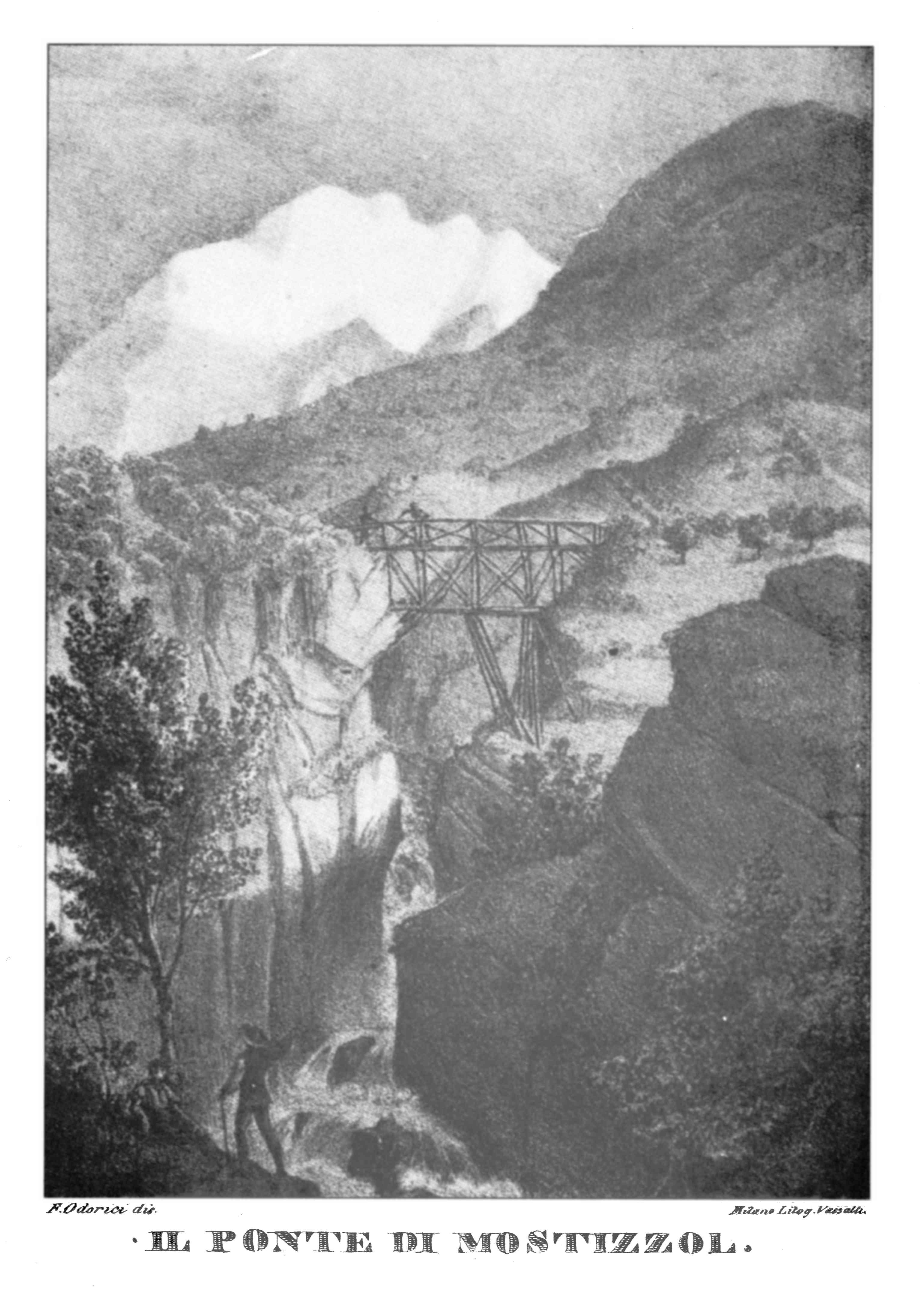 Ponte di Mostizzolo circa 1829; da "La Naunia descritta al viaggiatore" di Gioseffo Pinamonti